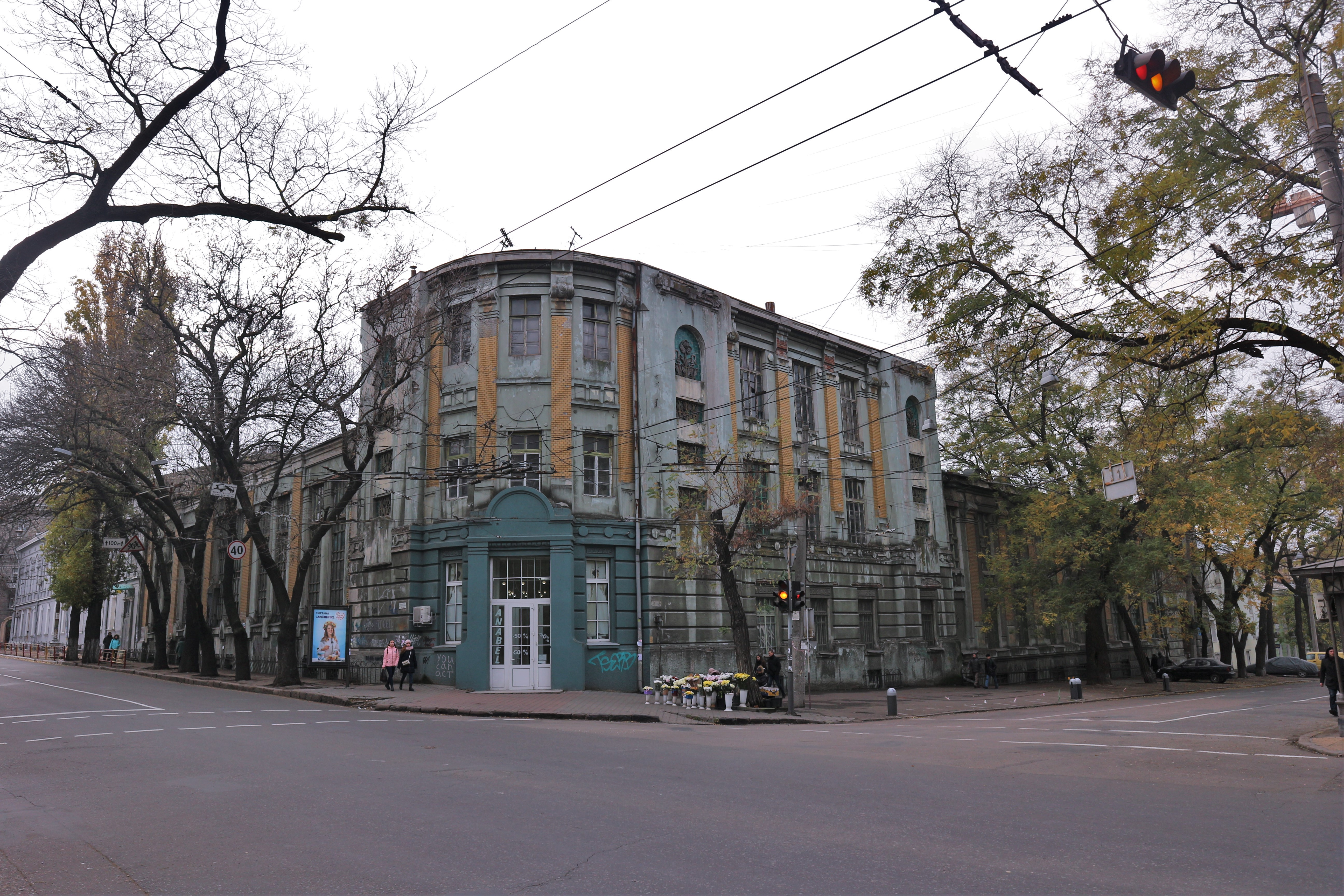 Вікі любить пам'ятки